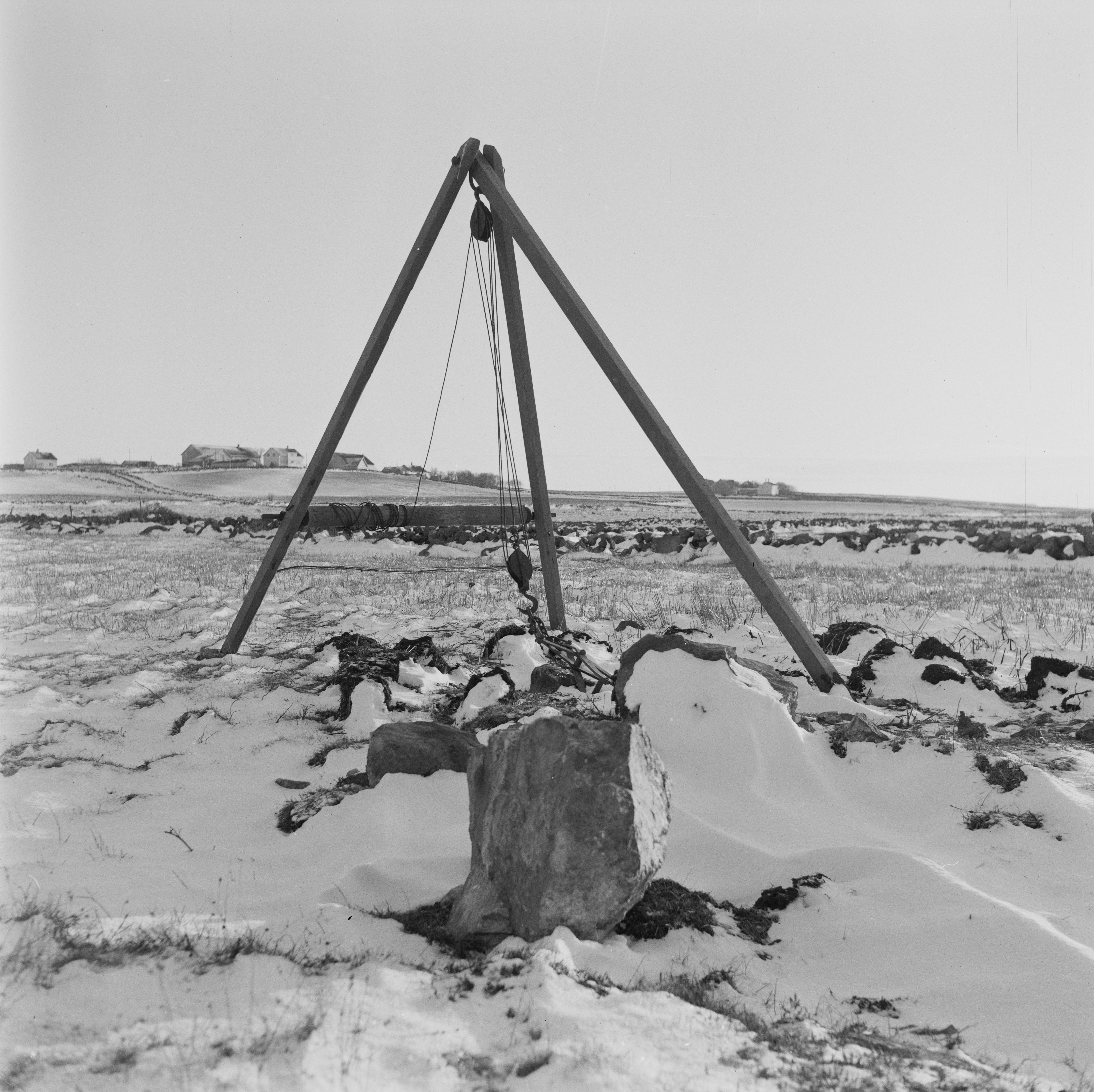 Bildet er hentet fra Arkivverket. Jæren-landskap Arkivinstitusjon : Riksarkivet Arkivnavn : Billedbladet NÅ Sted : Norge, Rogaland, , Jæren Emneord: Snø, Stein, Landskap, Jæren, Kran Avbildet